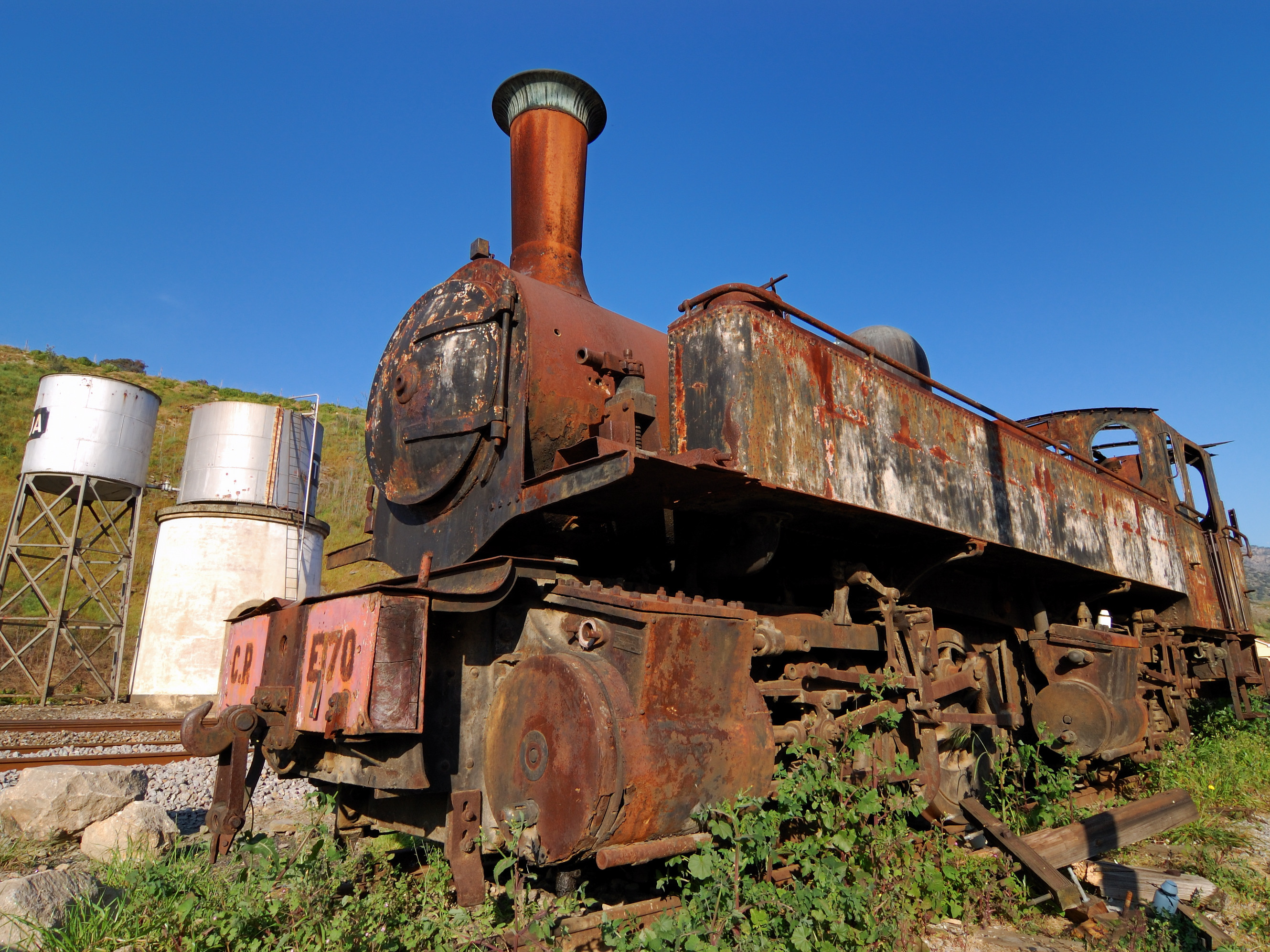 Estação do Tua, Portugal [2007]